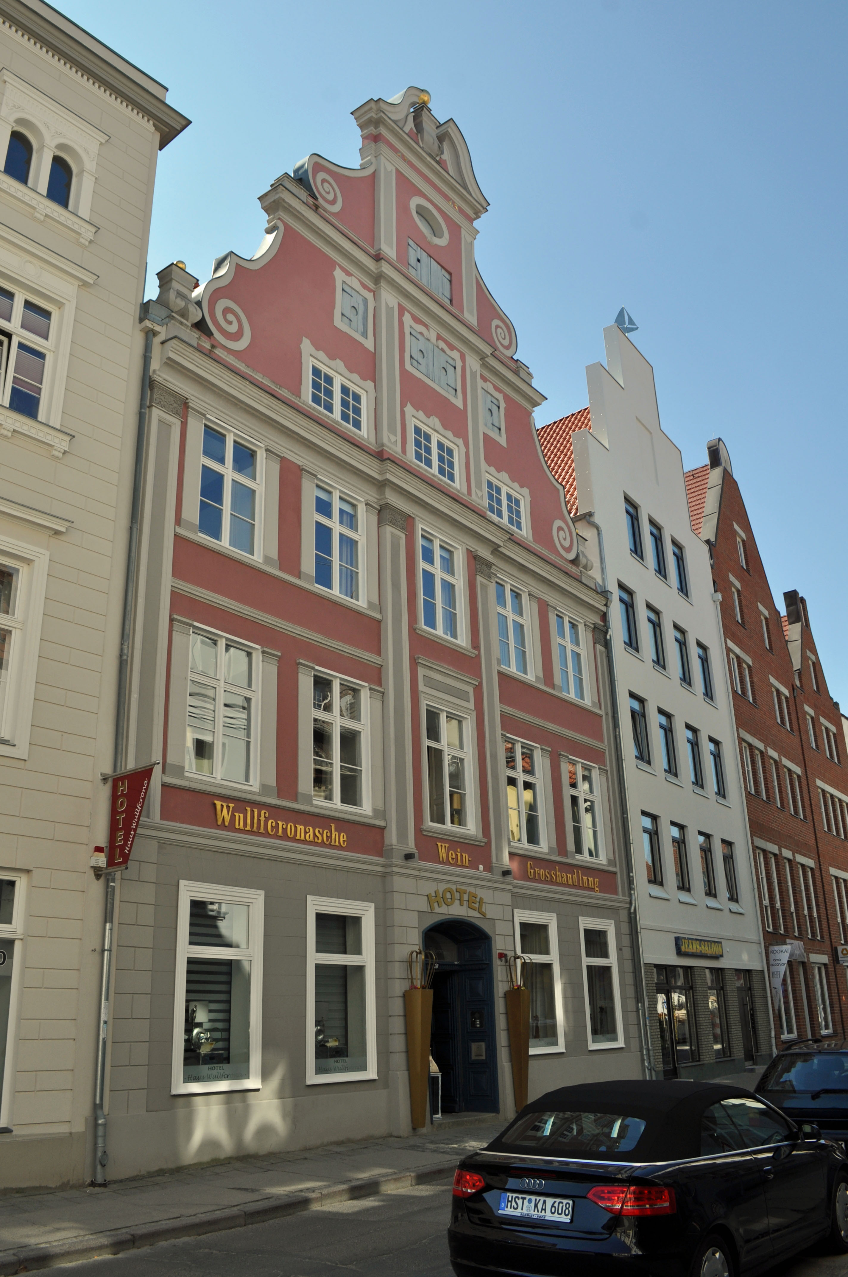 Gebäude bzw. Gebäudedetail in Stralsund. Straße und Hausnummer siehe Dateiname.